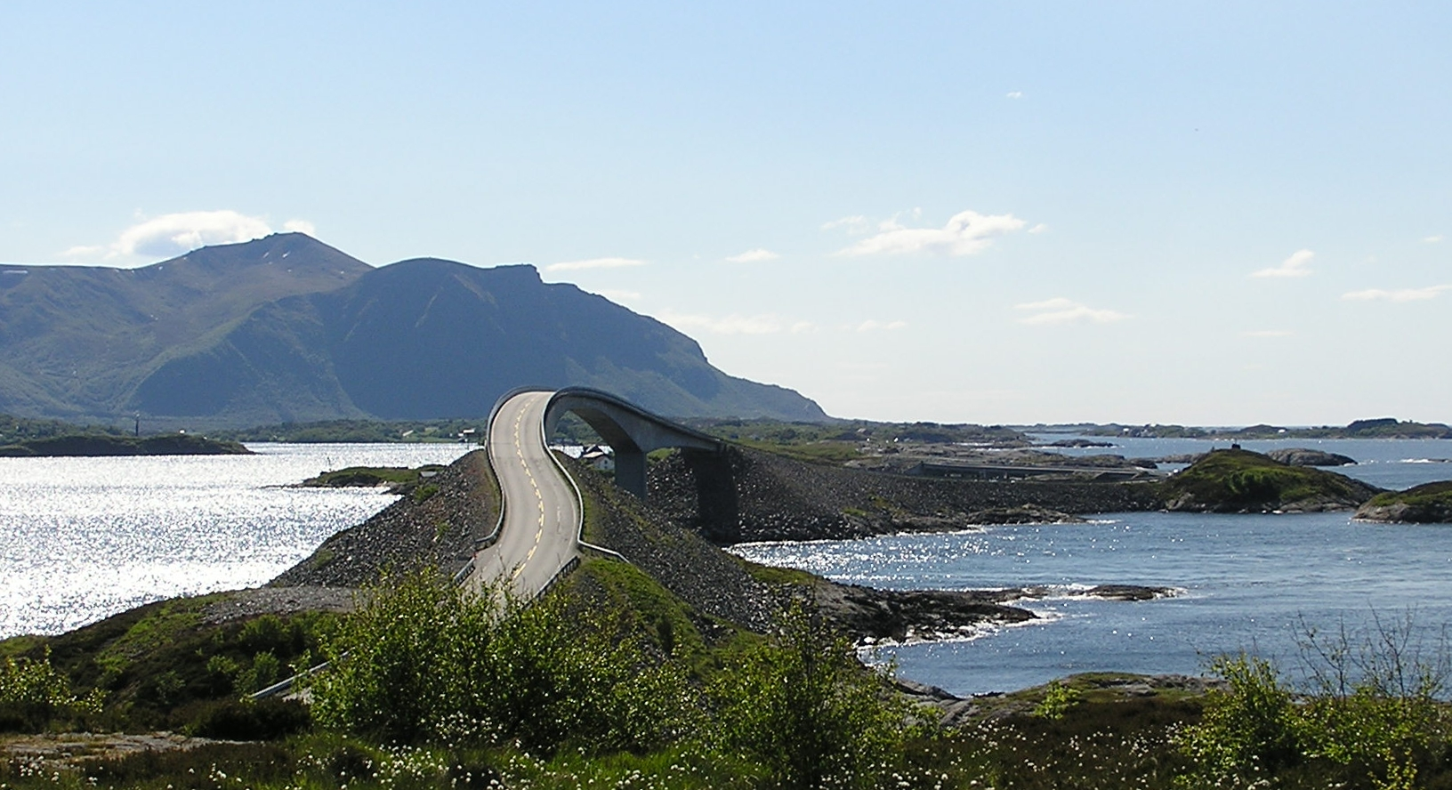 Atlanterhavsvegen